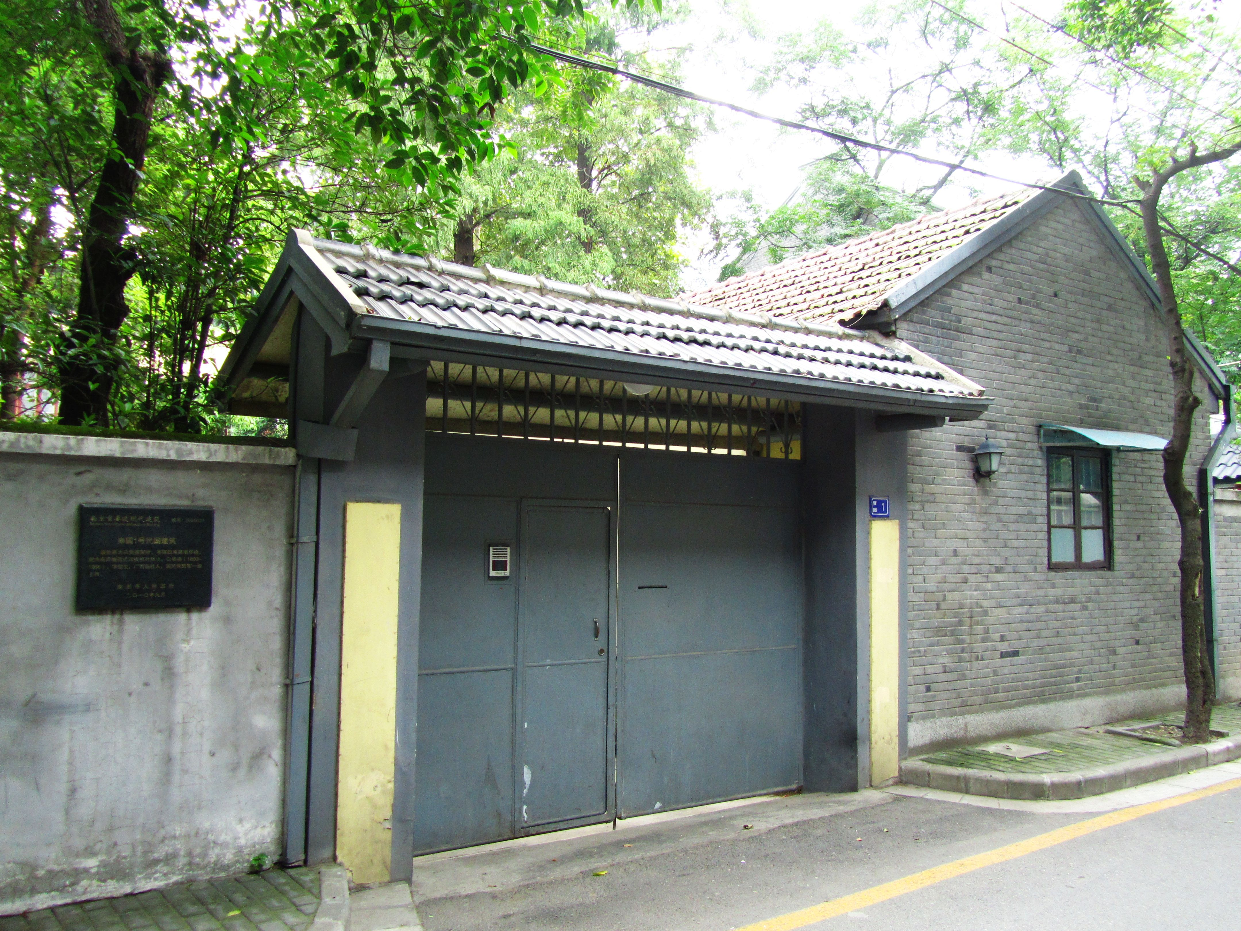 南京雍园1号白崇禧故居。